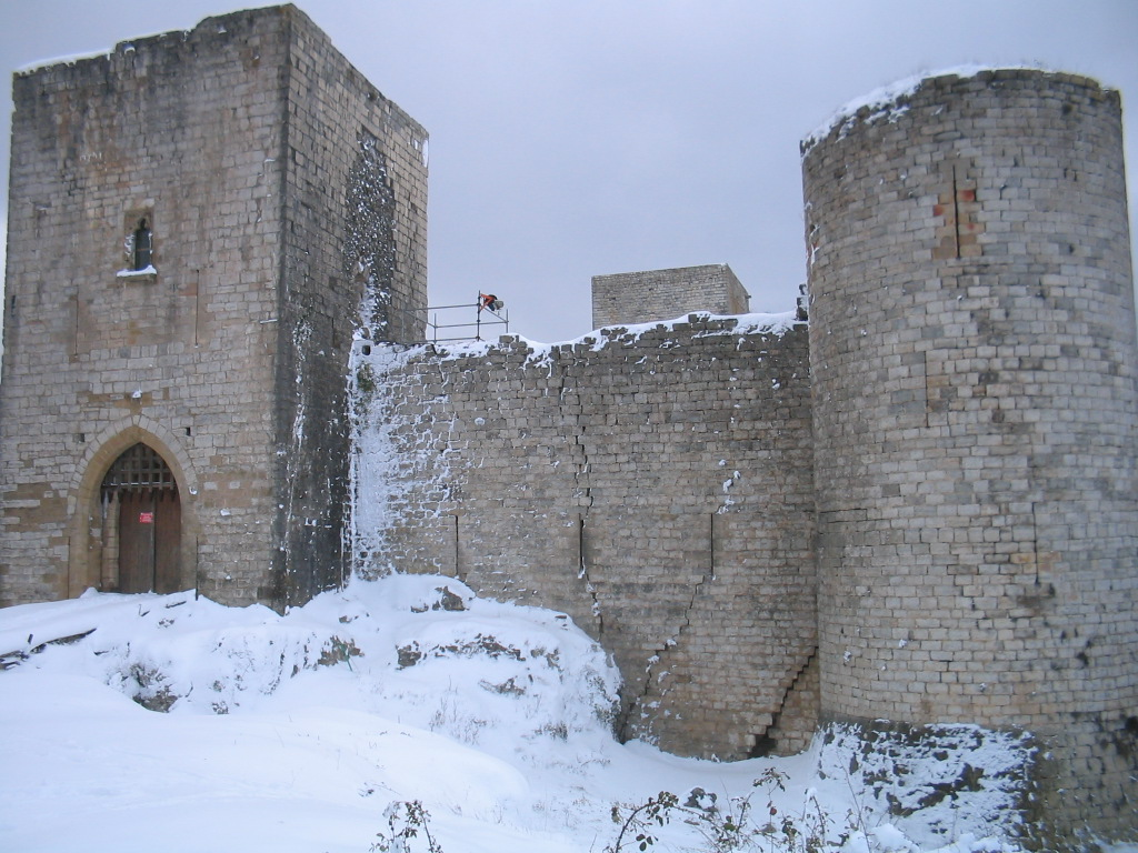 chateau de Puivert.